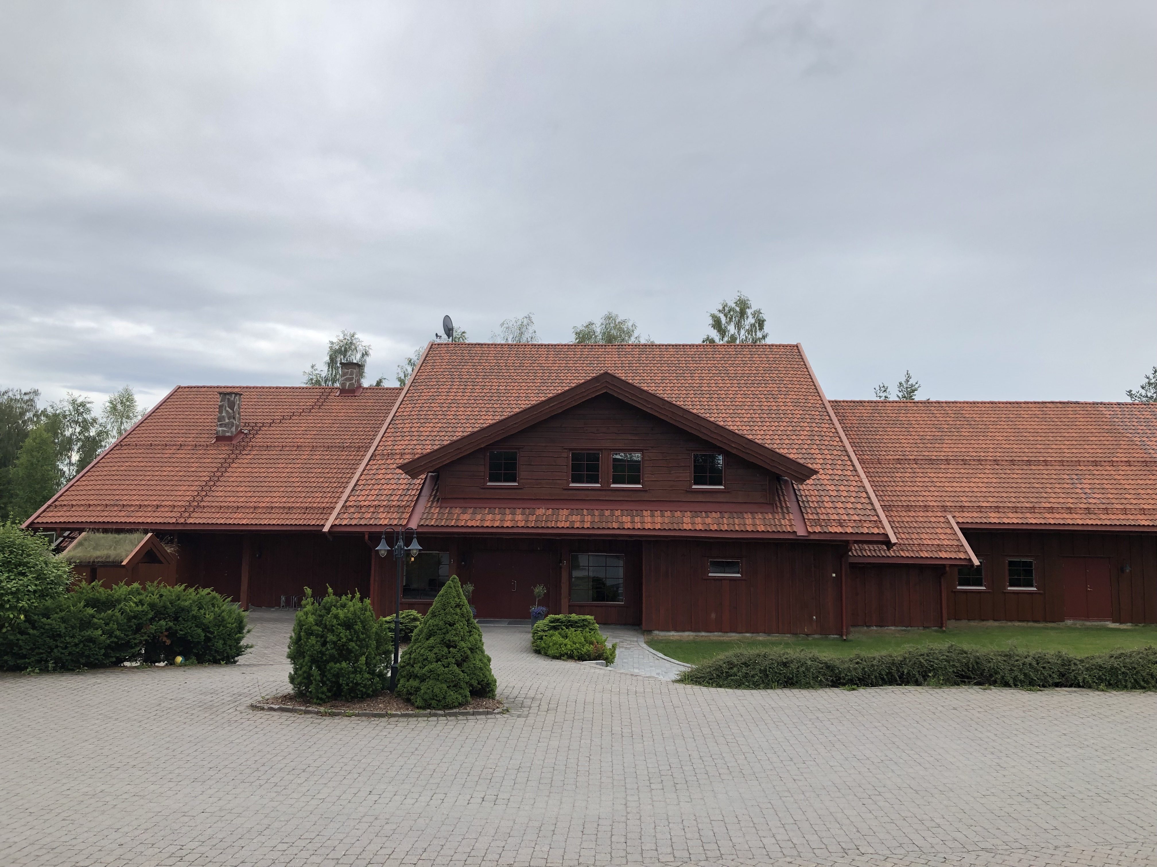 Hverventunet i Kartverksveien, Hønefoss.